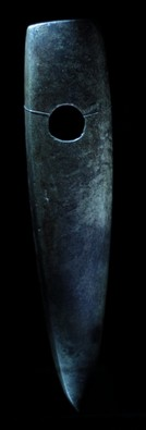 Ein Steingerät aus dem Fürstengrab von Leubingen. Exponat der Dauerausstellung im Landesmuseum Halle mit frdl. Genehmigung des Museums aufgenommen.